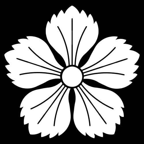 「撫子」紋（染抜）